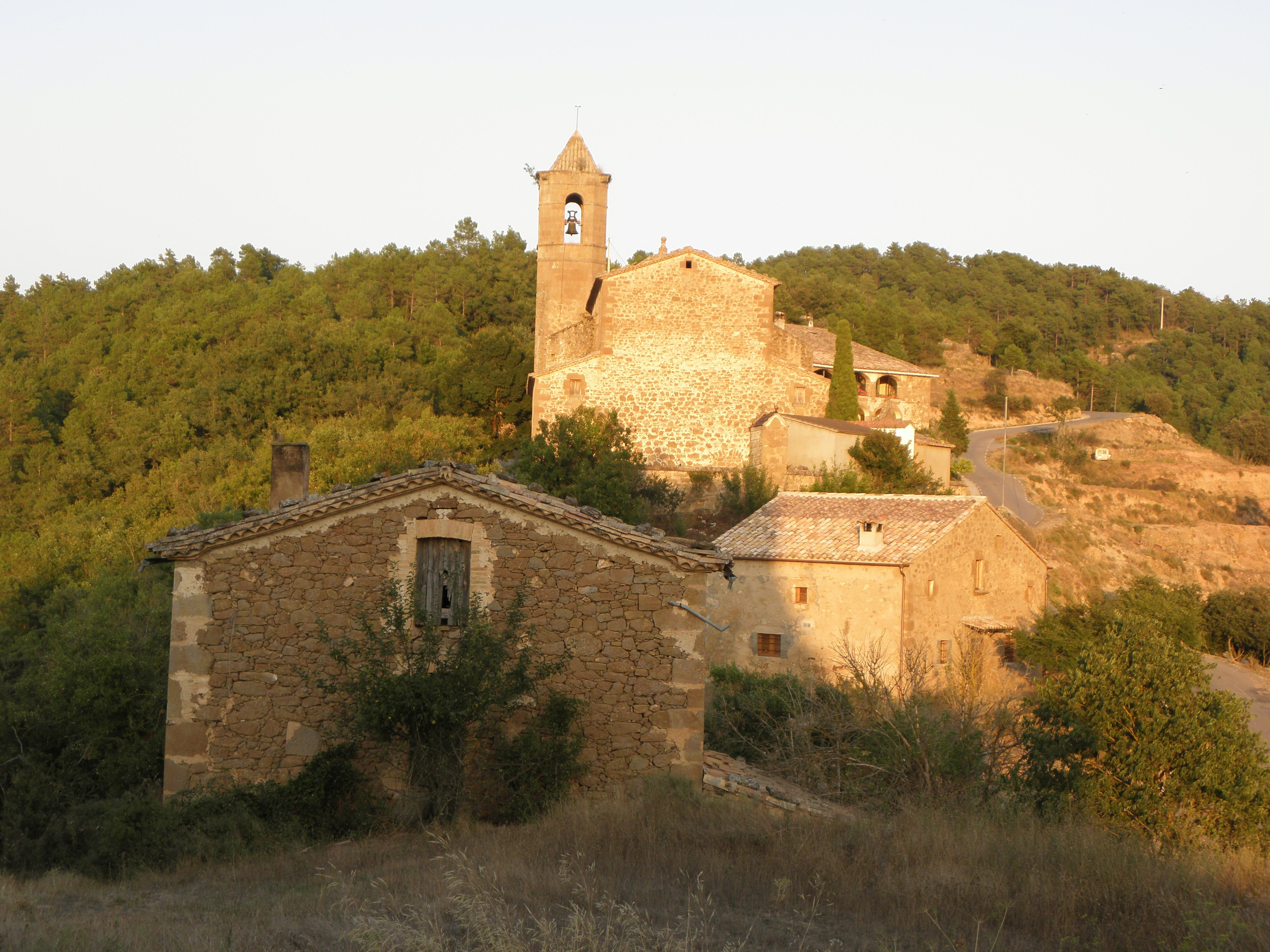 El nucli de Madrona (Pinell de Solsonès) vist des del castell de Madrona. A la derta, la carretera que puja cap a la masia de Sangrà i Sant Climenç